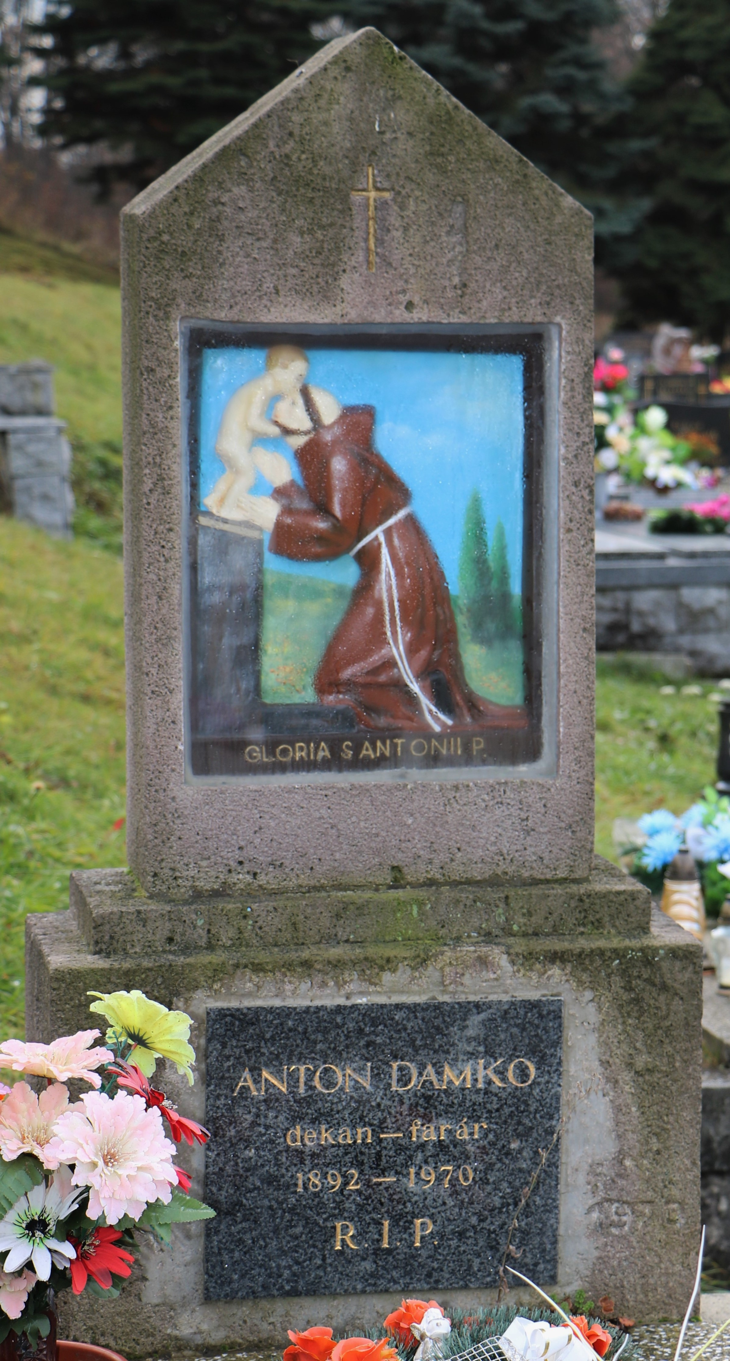 Náhrobník od akad. sochára Jozefa Damka, vytvorený pre svojho brata Antona Damka, prvého pitelovského farára.